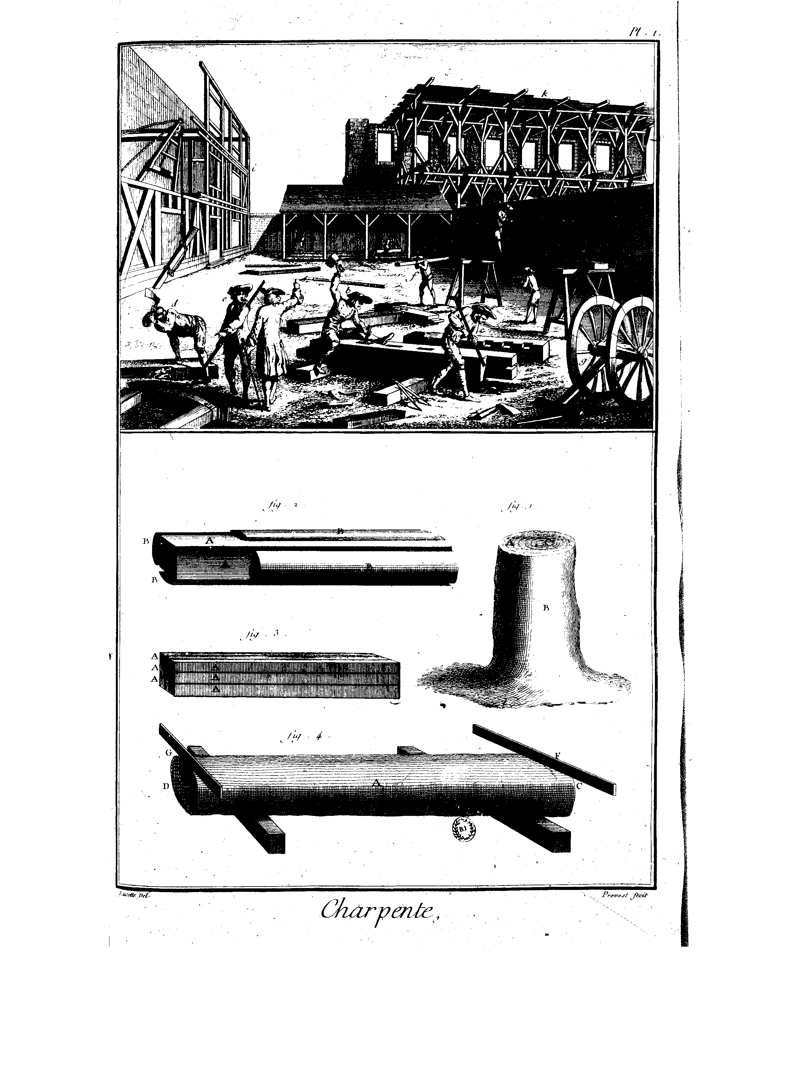 Planches de l'Encyclopédie de Diderot et d'Alembert, volume 2